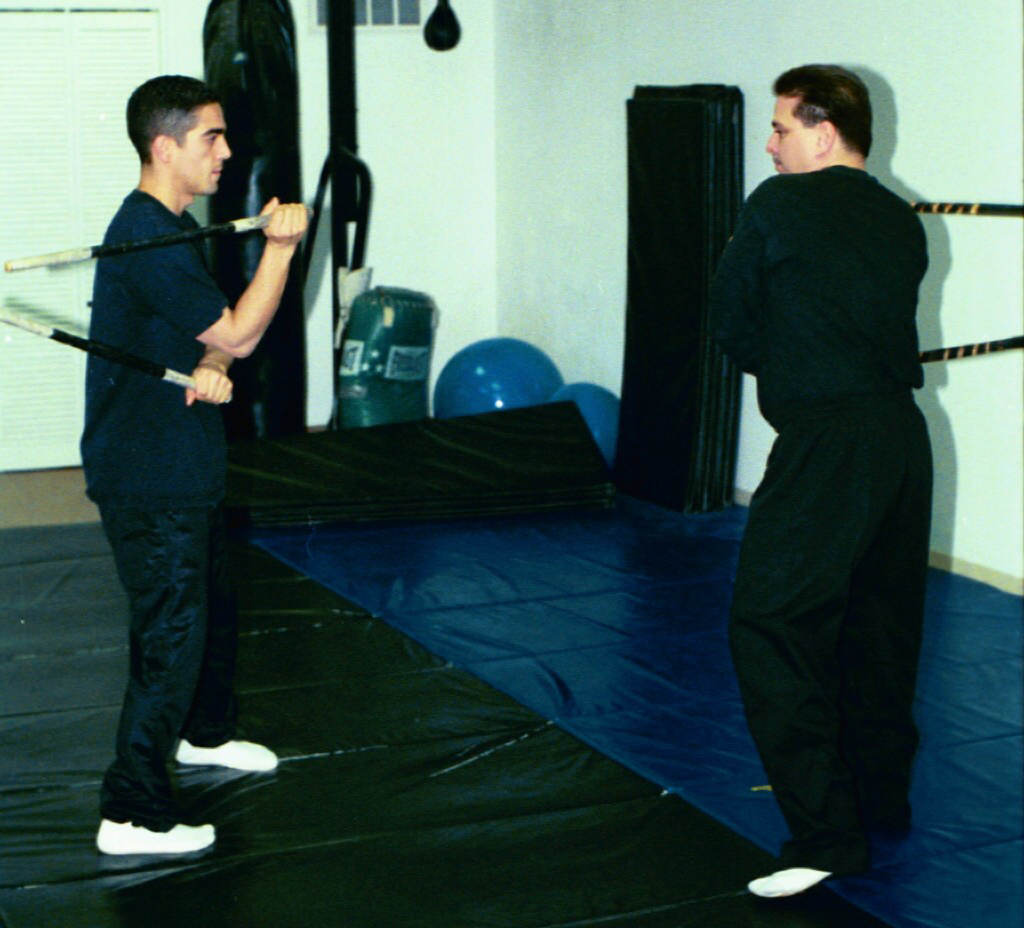 Doble baston